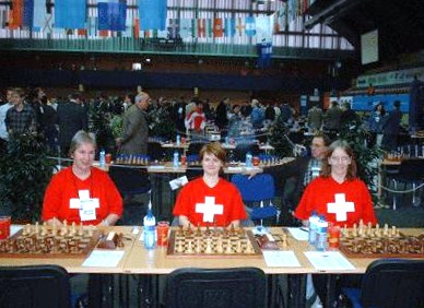 Schacholympiade 2000 in Bled, Spielsaal mit Schweizer T-Shirts.